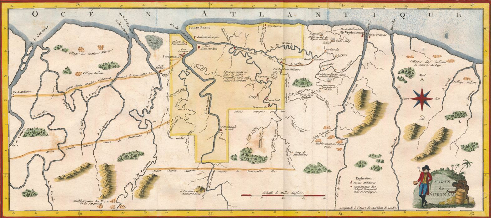 Stedman voyage a surinam pl V couleur